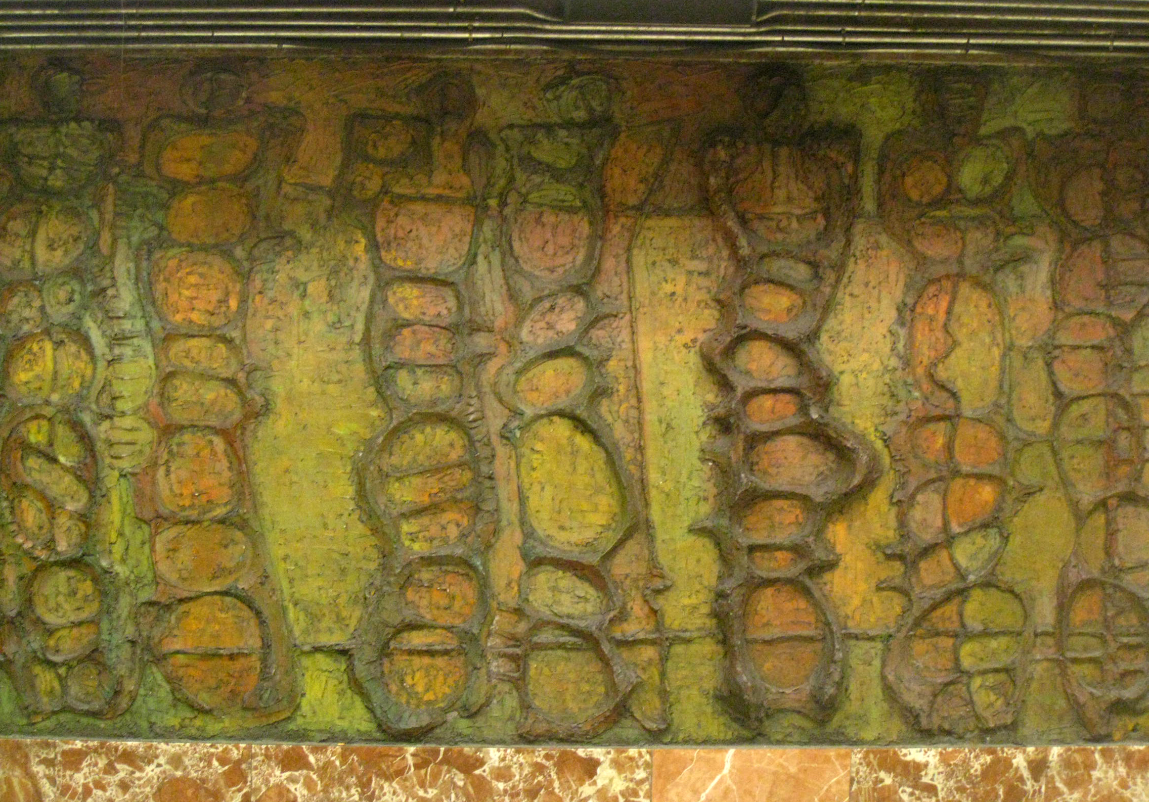 Metro L4 Estació Passeig de Gràcia. Ballarins nus (Angel Orensanz). Estació de Passeig de Gràcia, accés per pg. de Gràcia amb Gran Via (Barcelona)